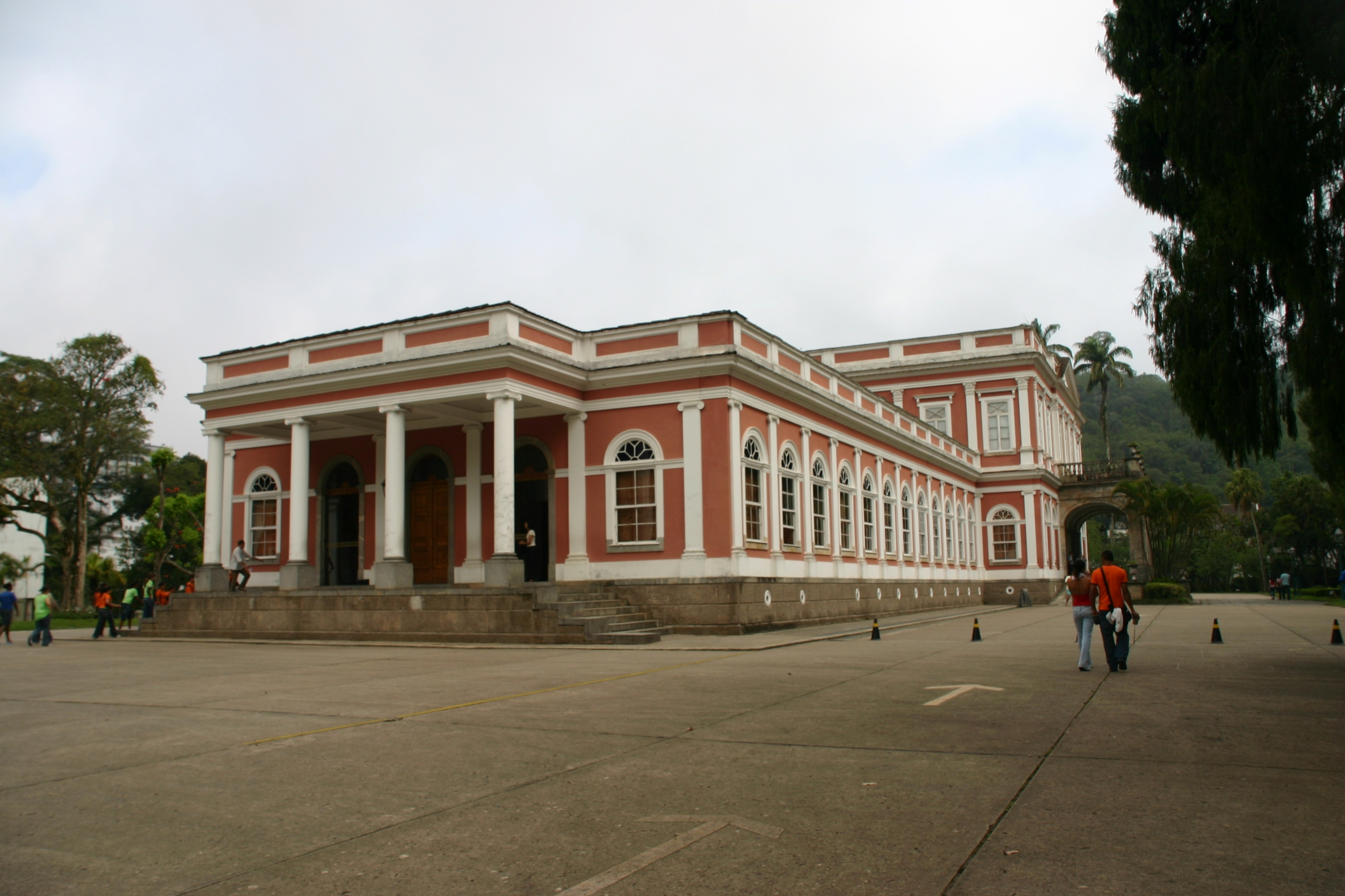 Le Musée imperial de Petrópolis Petrópolis, Etat deÉtat de Rio de Janeiro Brésil.